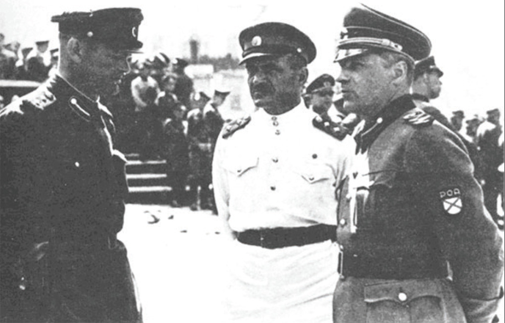 Военнослужащие РОА полковник В. Боярский, полковник К. Г. Кромиади и генерал Г. Н. Жиленков. Псков. 1943 год.